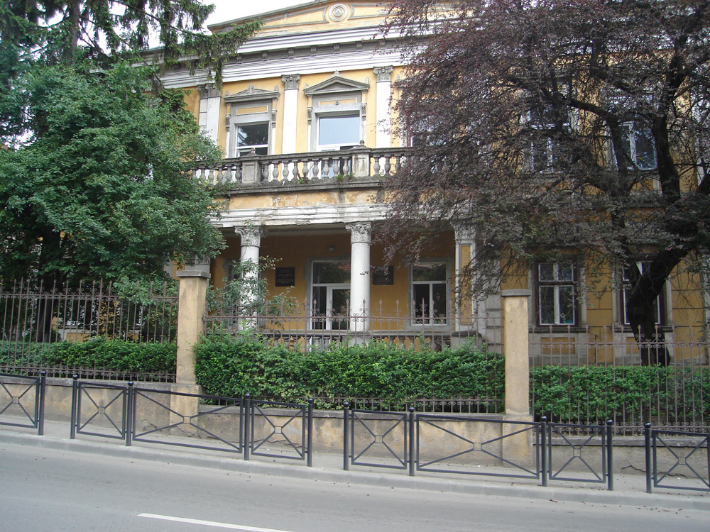 Vályi Gábor háza Kolozsvárott, Majális (Republicii) utca 20. (ma CFR-kórház)